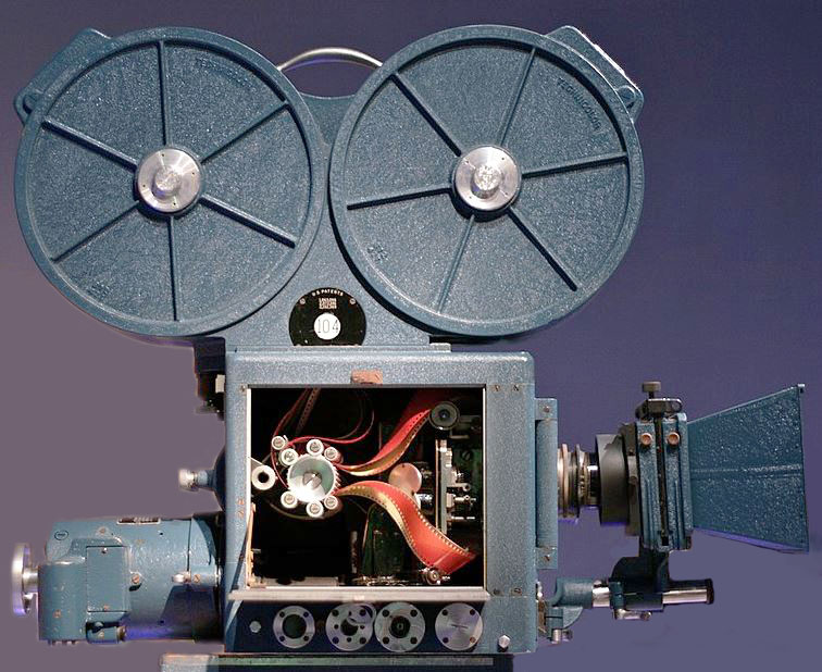 Caméra TECHNICOLOR trichrome ouverte. New York, Museum of the Moving Image.